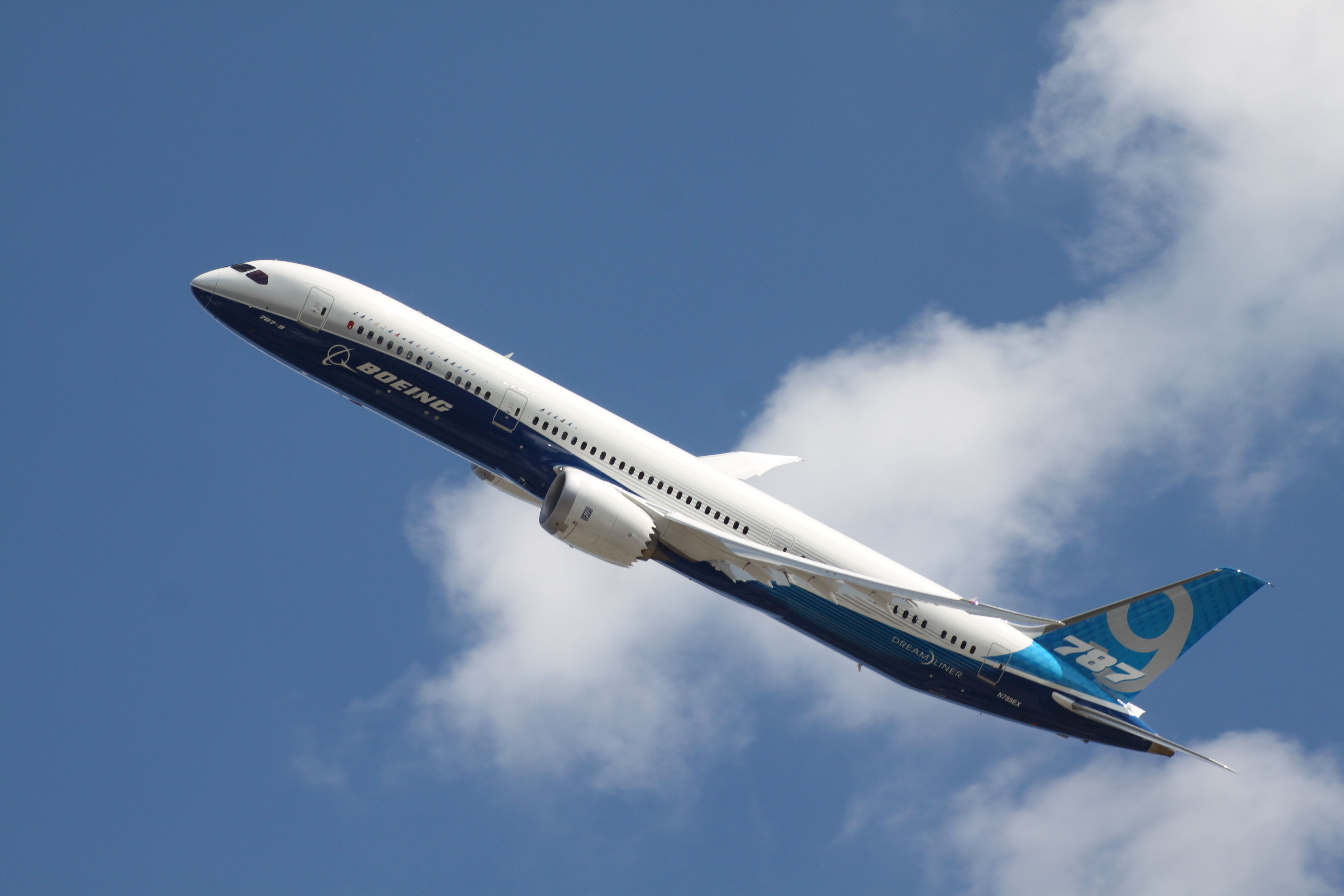 Taken from back garden